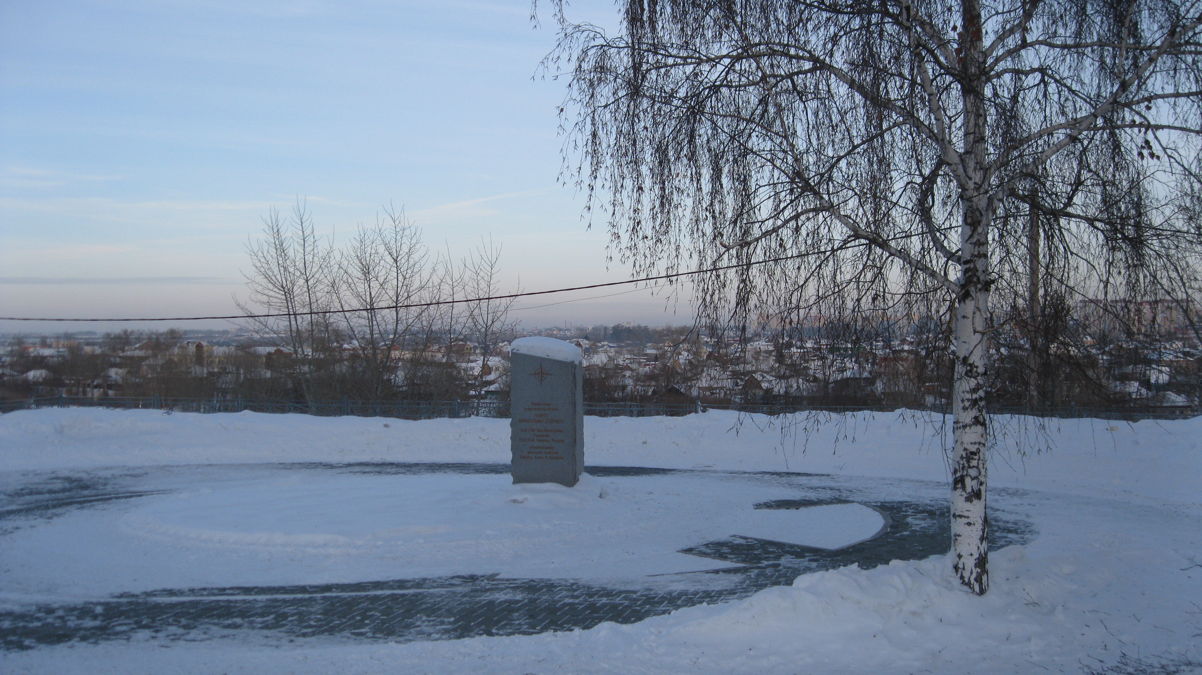 Могила Георга Вильгельма Стеллера в Тюмени